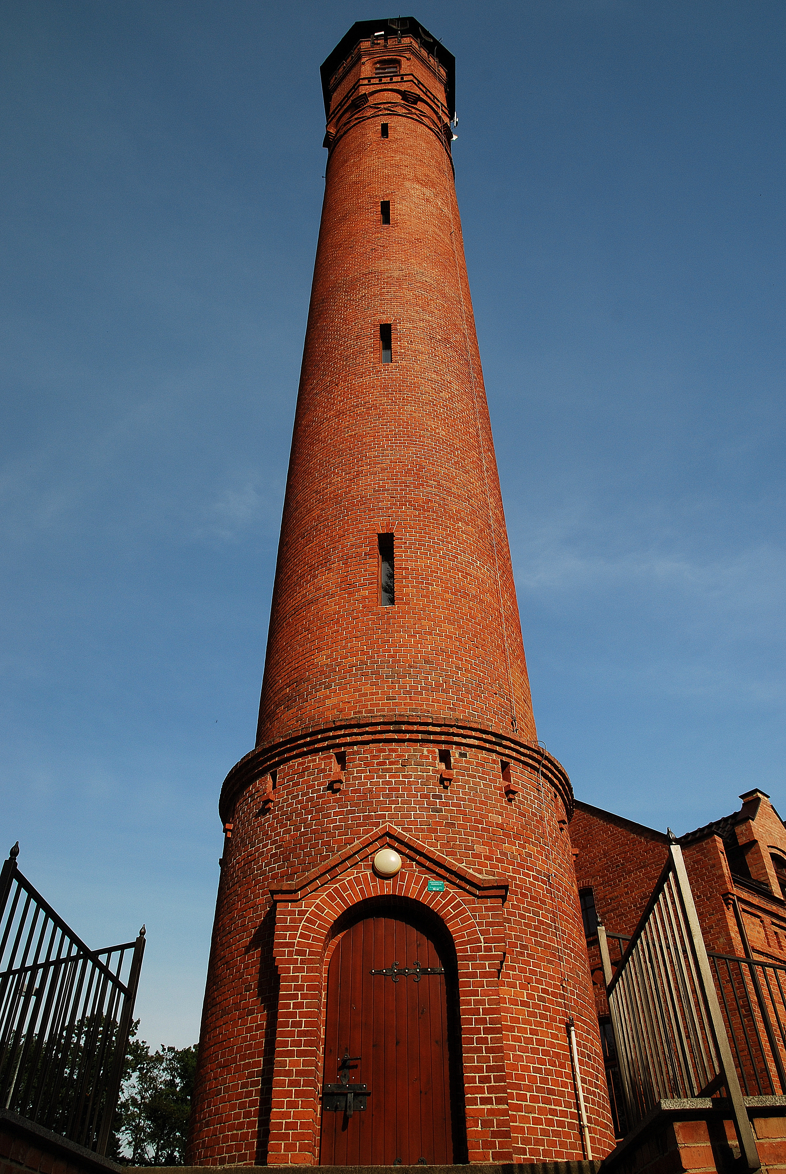 Dostrzegalnia pożarowa obok leśniczówki w Starym Kuźni gmina Bierawa woj. opolskie OP